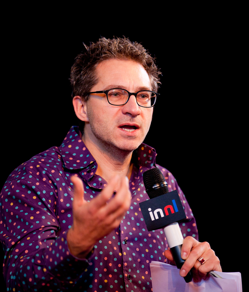 Woensdag 17 november 2010 organiseerde het Nationaal Historisch Museum voor de tweede keer een internationale conferentie over nieuwe technologie en media. In 2010 was het thema 'innovatie en oral history'. Vijf sprekers uit binnen- en buitenland benaderen het onderwerp vanuit verschillende invalshoeken. Foto: Fred Ernst